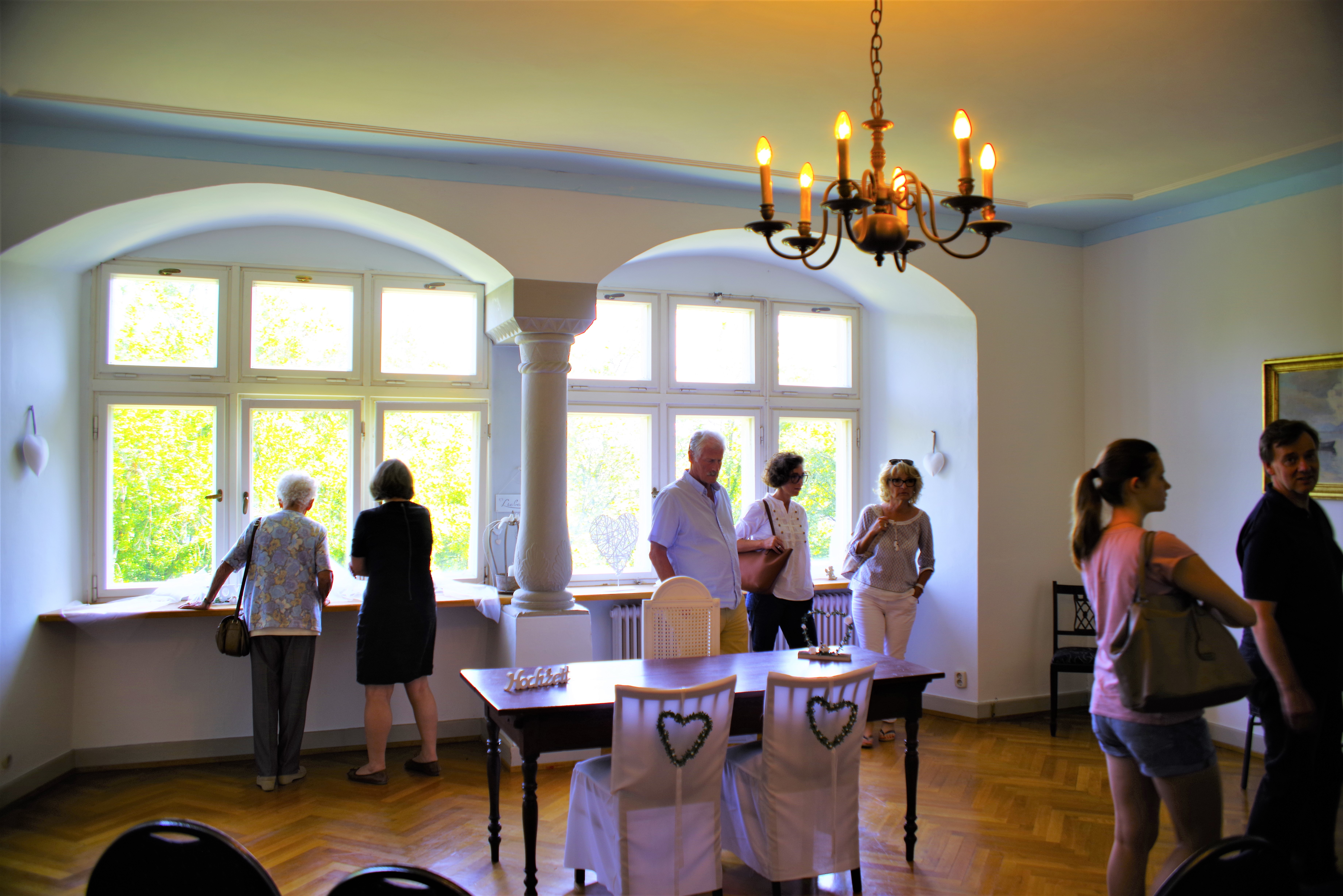 Standesamtszimmer im Schloss Hohenlupfen